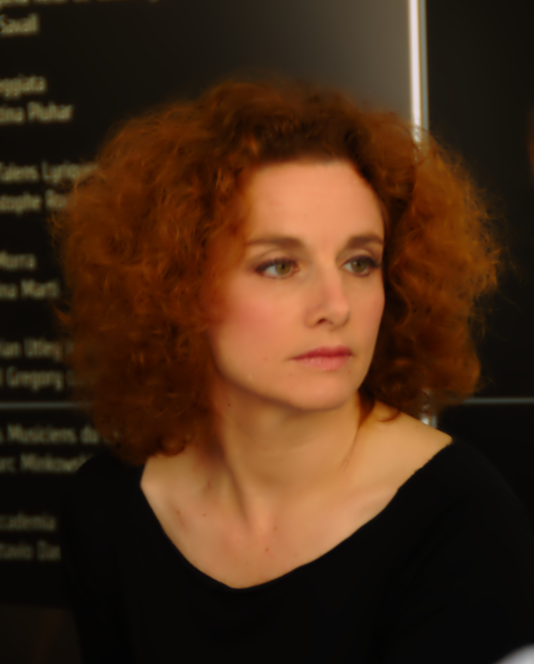 Emmanuelle Haïm podczas konferencji prasowej inaugurującej 8. festiwal Misteria Paschalia